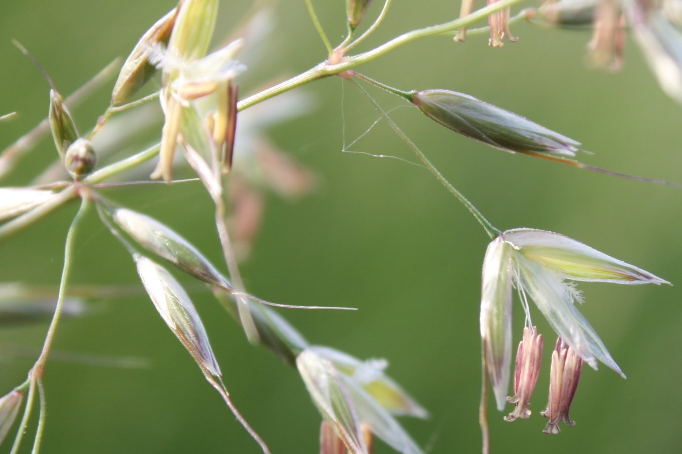 Arrhenatherum elatius: Flowers